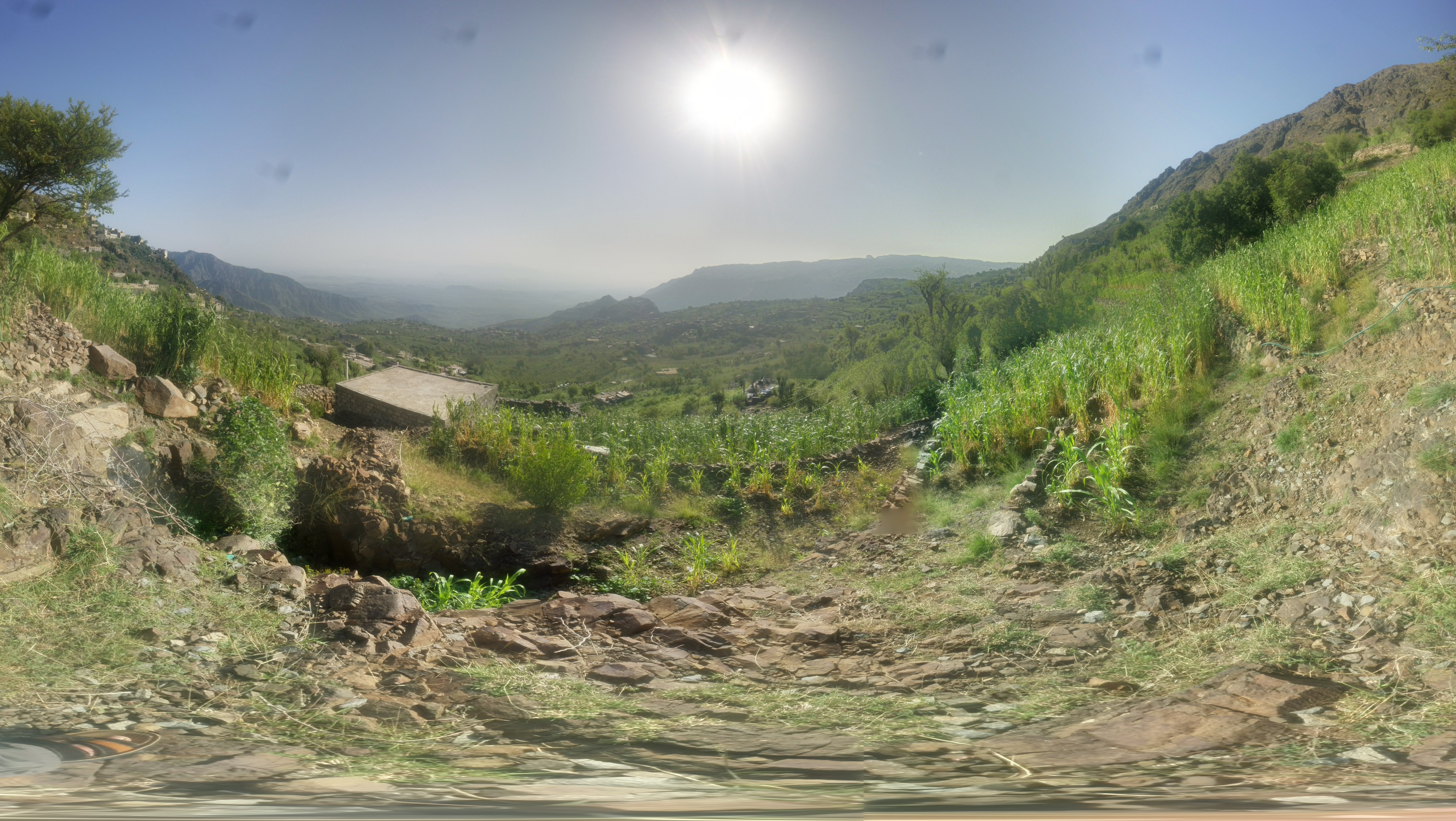 حوراء سامع تعز اليَمَن من تصويري معاذ السامعي